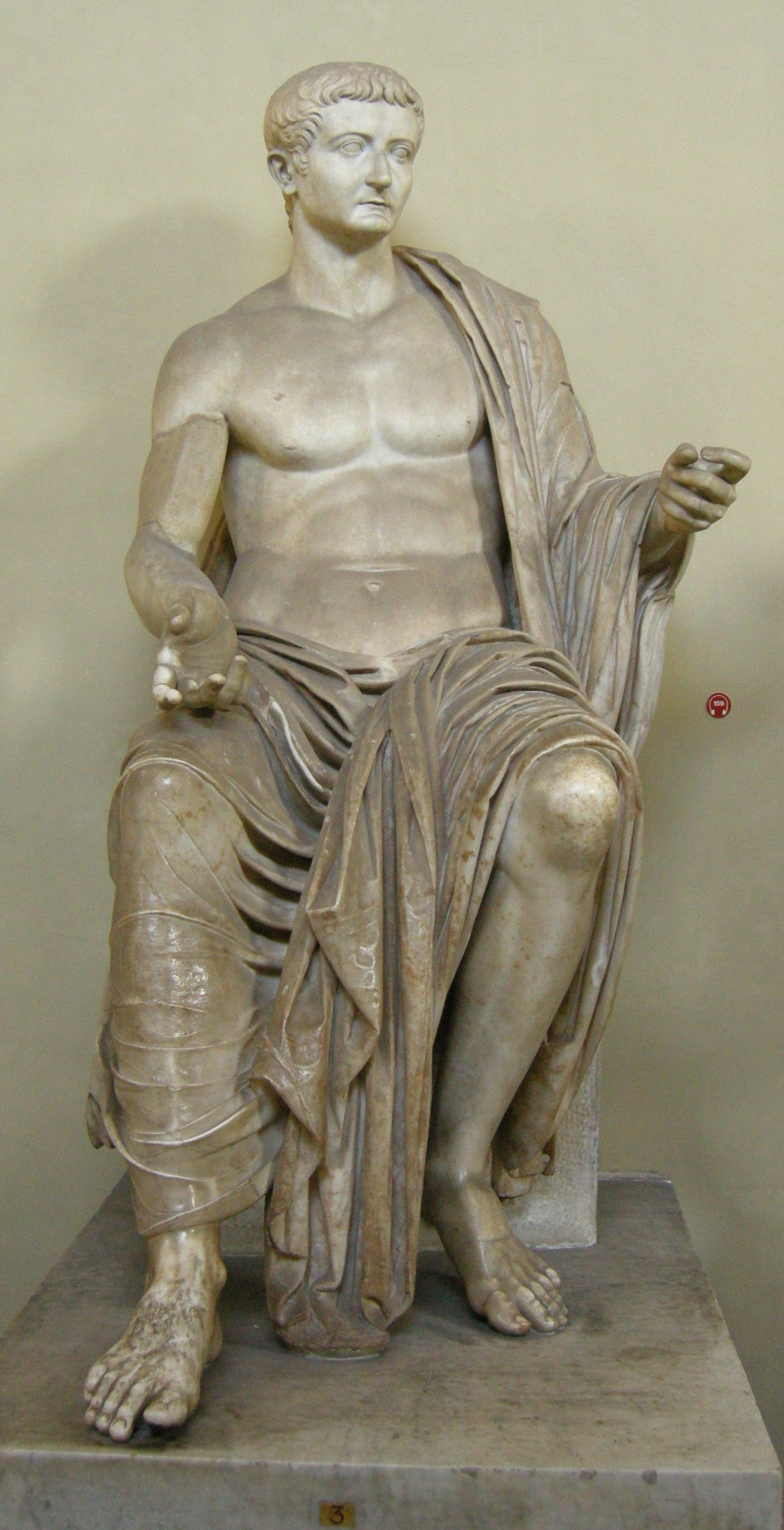 Statua di tiberio da Priverno, post 37 dc. /Museo Chiaramonti.